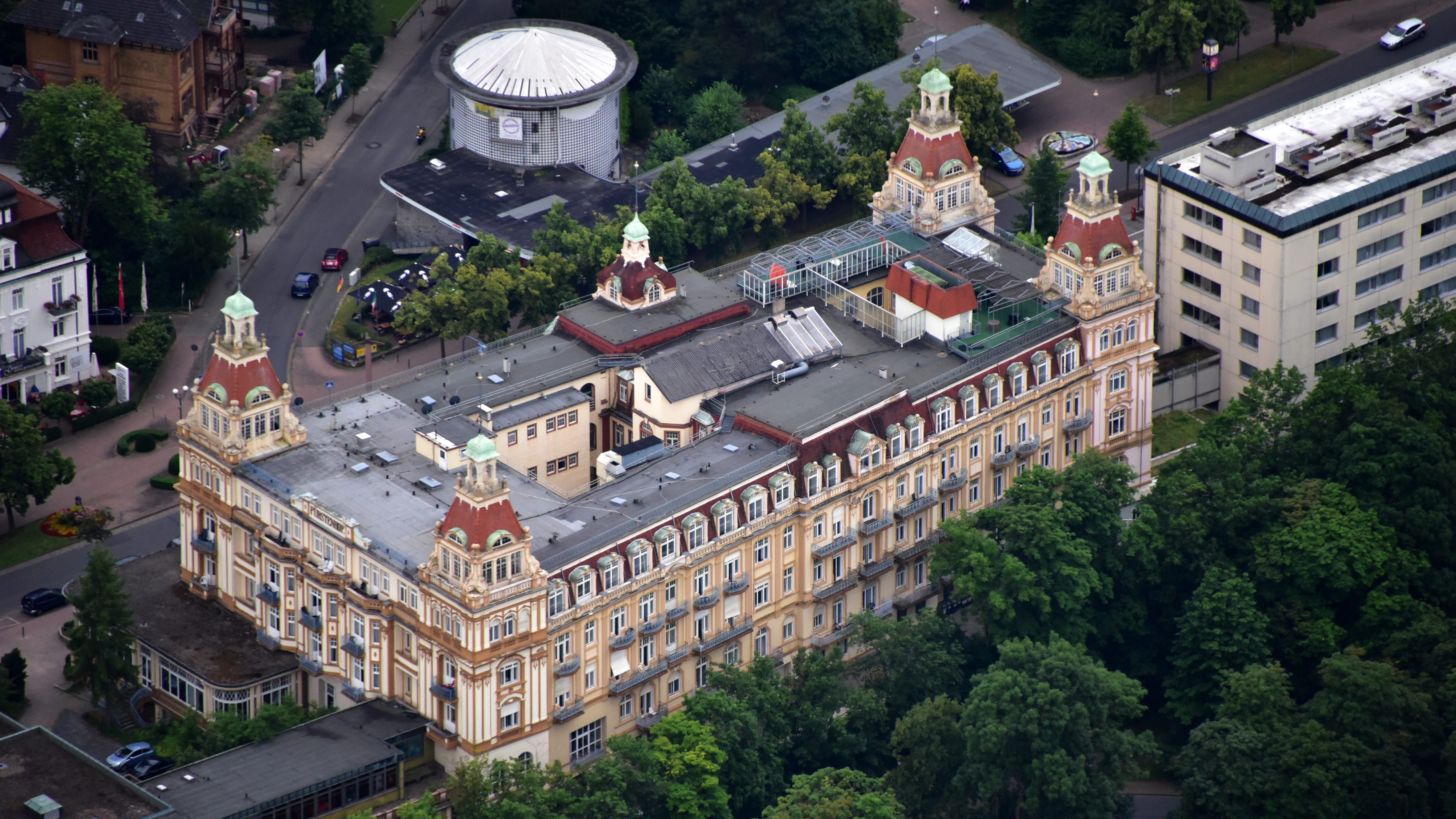 Bad Wildungen, Fürstenhof, Luftaufnahme (2016)